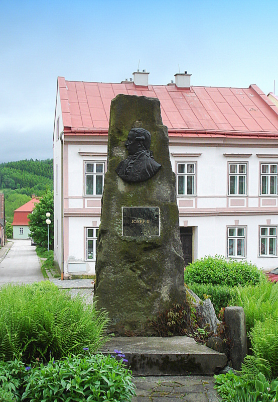 Zaclerz, obelisk cesarza Józefa II